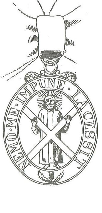 Illustratie uit “Handbuch der Ritter und Verdienstorden” Maximilian Gritzner Leipzig 1893. Eigen scan. Het copyright is verlopen. Robert Prummel 2 jun 2006 23:53 (CEST)